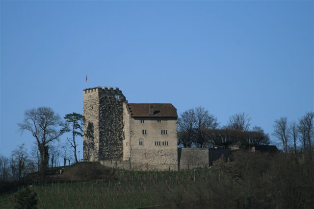 Schloss Habsburg, Habsburg AG, Schweiz